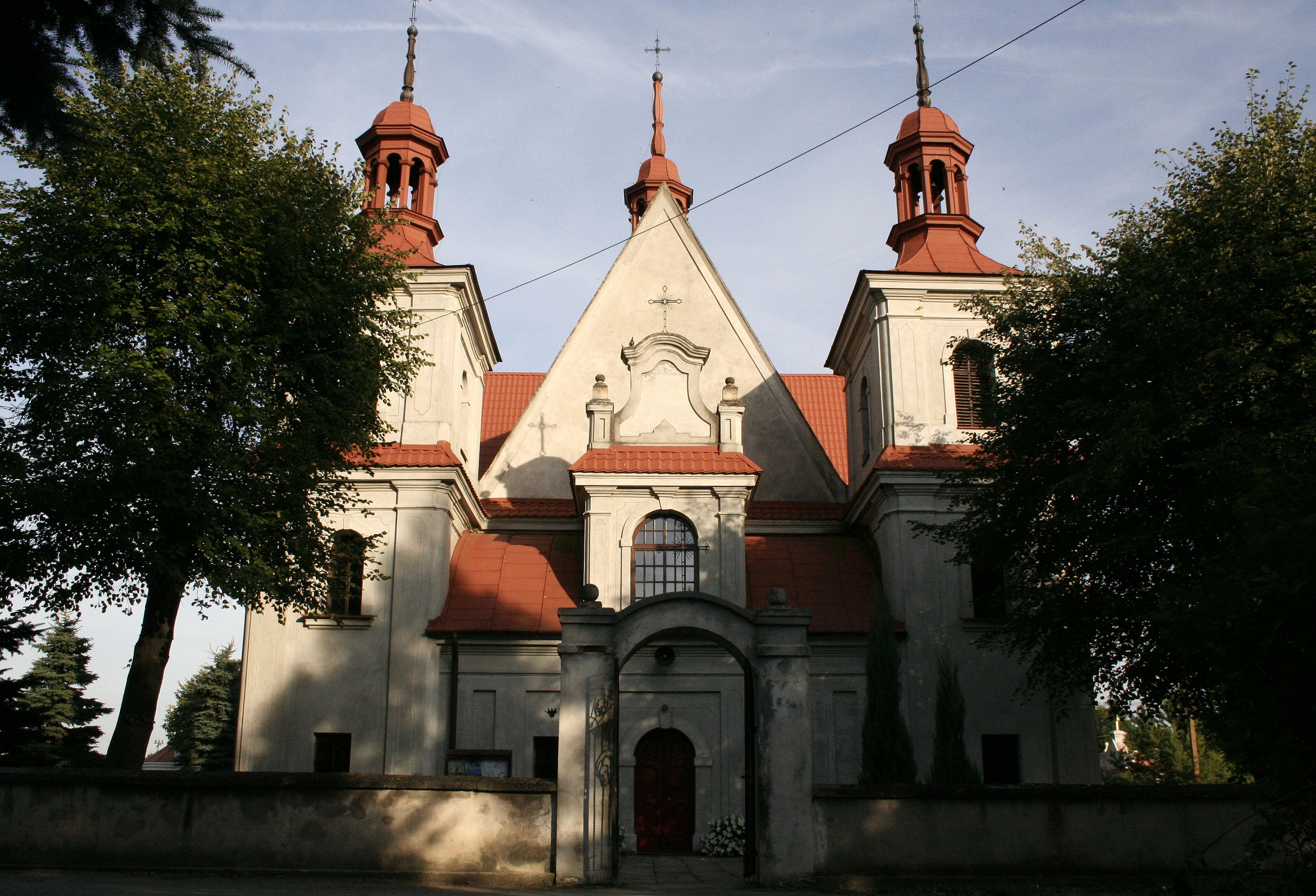 Góry Wysokie, kościół par. pw. Matki Boskiej Bolesnej, lata 1718-1741, 1792-1795, 1948-1949